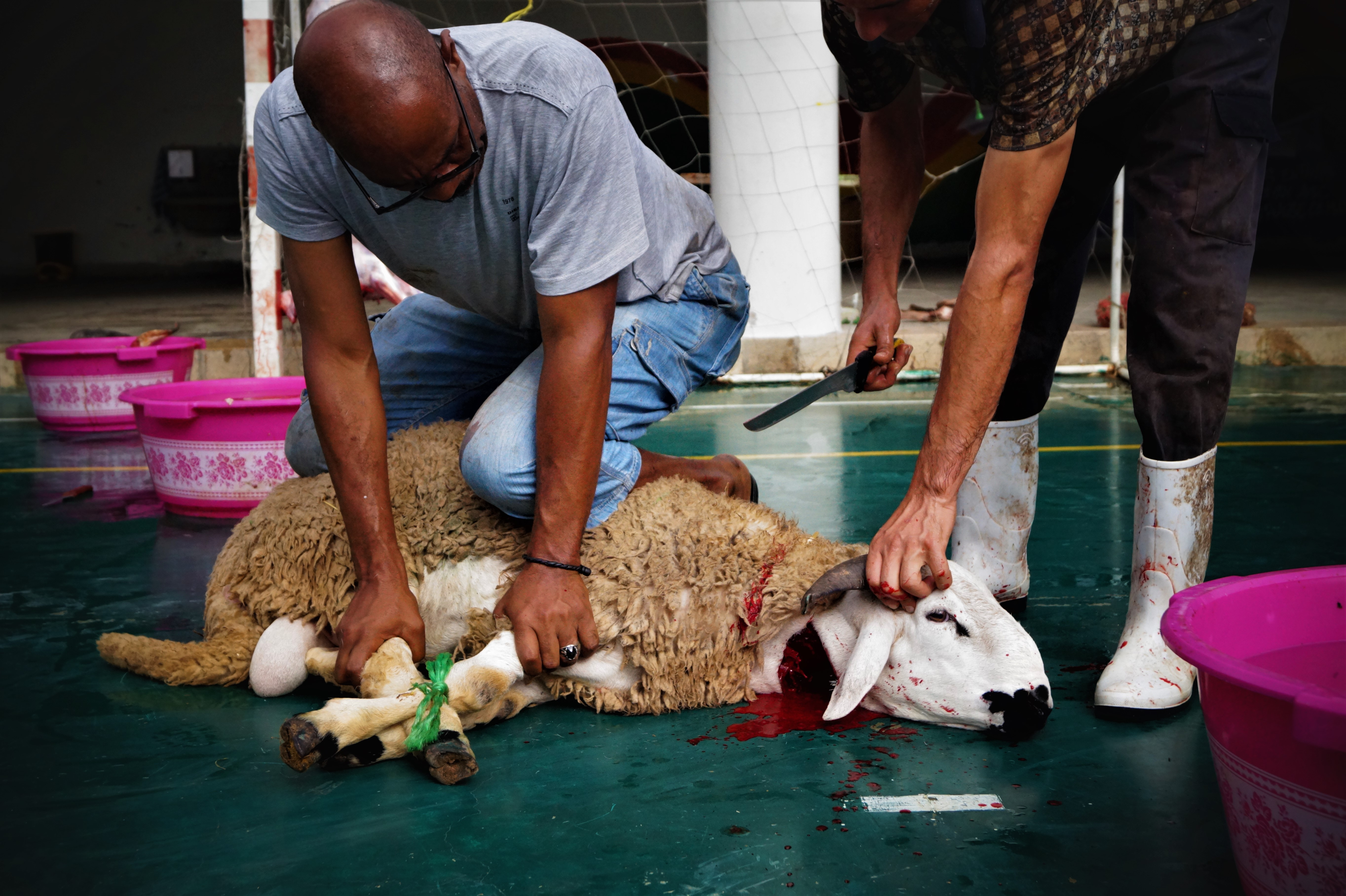 Sacrificio de un bovino durante la fiesta musulmana de Eid al-Adha 2018 en un el patio de una casa-hogar de Casablanca, Marruecos. De acuerdo a la tradición musulmana, y para que la muerte del animal fuera considerada "hallal", la cabeza del animal apuntaba hacia la Meca al momento de ser degollada, y se le dejó desangrar por completo antes de comenzar a despellejarlo.